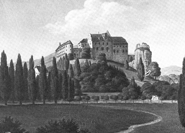 Schloss Canstein, Ansicht der Anlage von Süd-Westen aus dem 19. Jahrhundert, Öl auf Leinwand